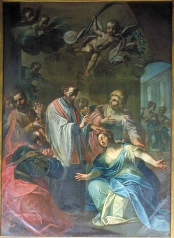 San Valentino che guarisce la figlia del giudice Asterio, pala del pittore Giuseppe Carlo Pedretti datata 1762 e conservata nella Chiesa parrocchiale di San Valentino a Salara